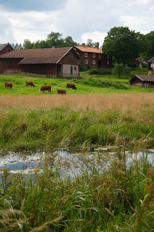 Landskapsbild, omgivningarna kring Stimmerbo.